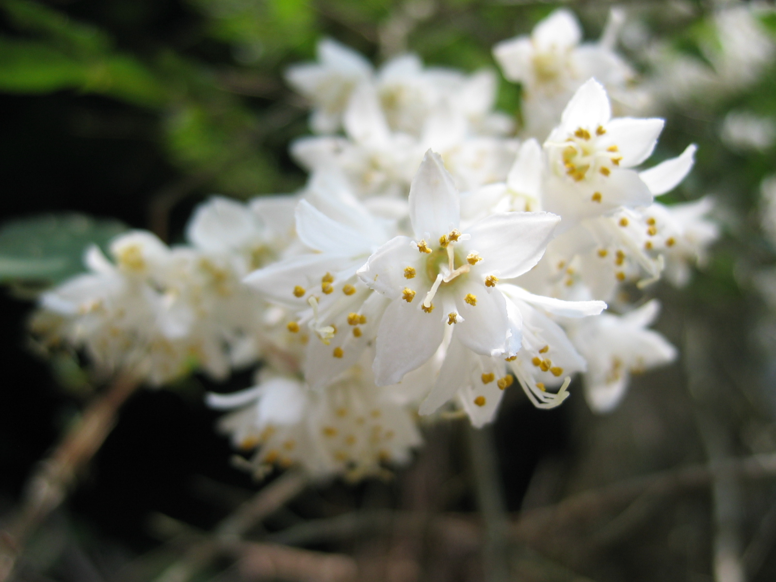 ウツギ (学名:Deutzia crenata)